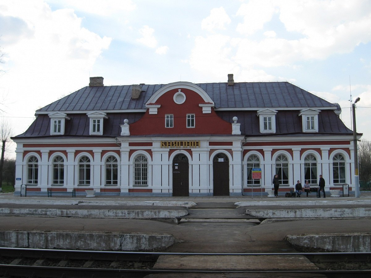 Княгінін. Вакзал